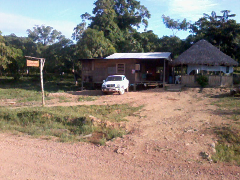 Comedor Yany en la Comunidad de Sumobila, Puerto Cabezas, RAAN